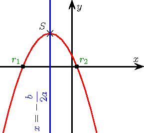 Parabole dans le cas et